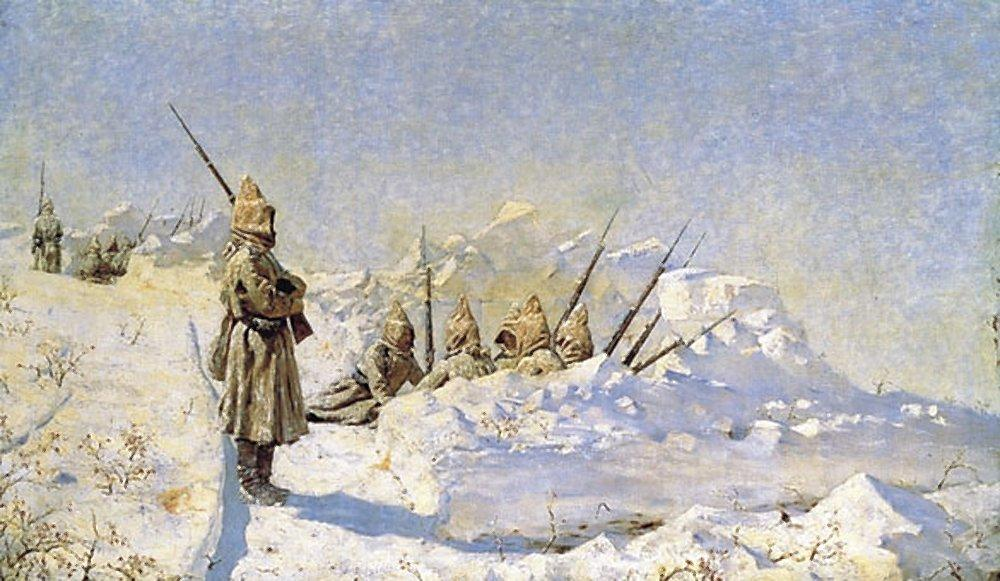 Снежные траншеи (Русские позиции на Шипкинском перевале)